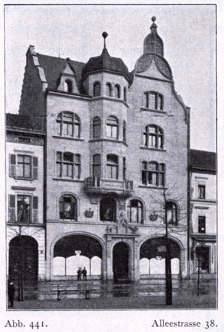 Geschäfts- und Wohnhaus Alleestraße 38 (heute- Heinrich-Heine-Allee) in Düsseldorf, erbaut vor 1904, Architekt Philipp Fischer, Bauherr P. J. Stübben.jpg